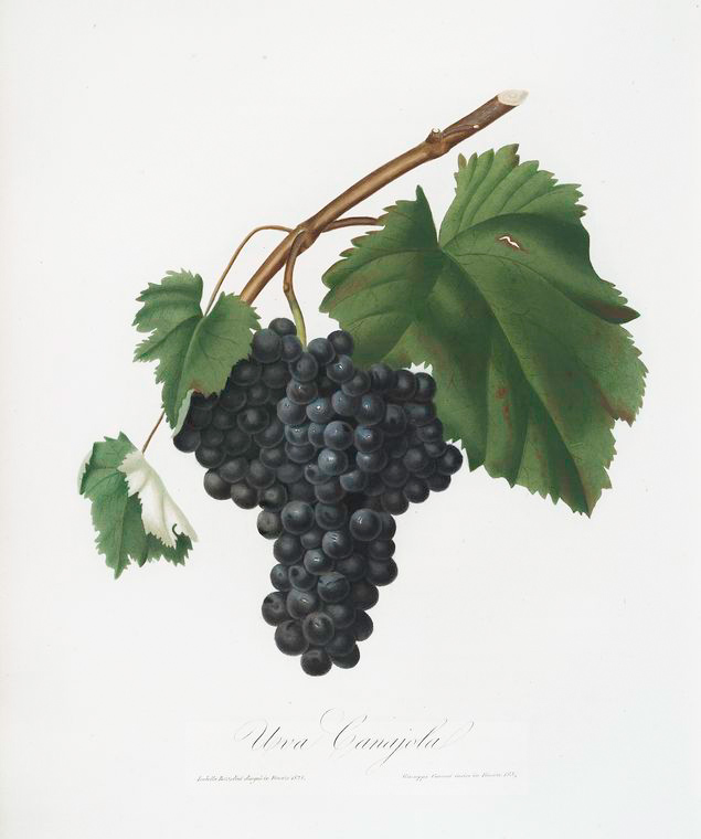 Uva Canaiola (Vitis vinifera etrusca ; Black Canaiolo) from « Pomona Italiana » : Trattato degli alberi fruttiferi conteneate la Descrizione delle megliori varietáa dei Frutte coltivati in Italia, accompagnato da Figure disegnate, e colorite sul vero - Giorgio Gallesio.